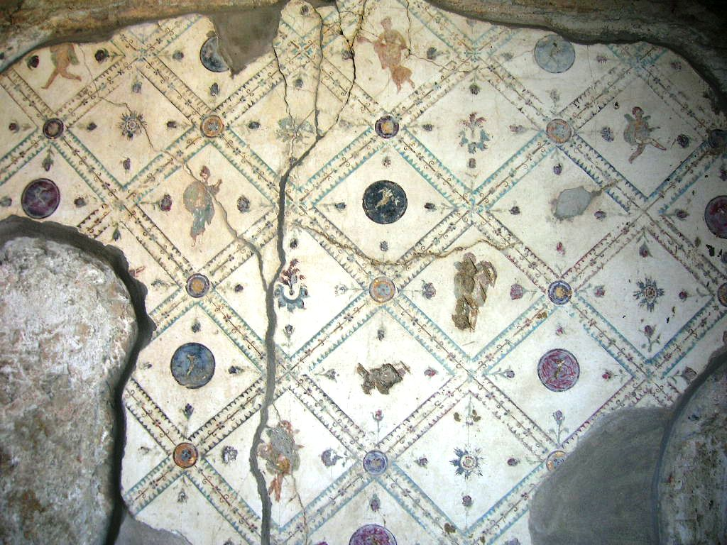 Particolare della decorazione a piastrelle di Villa Arianna